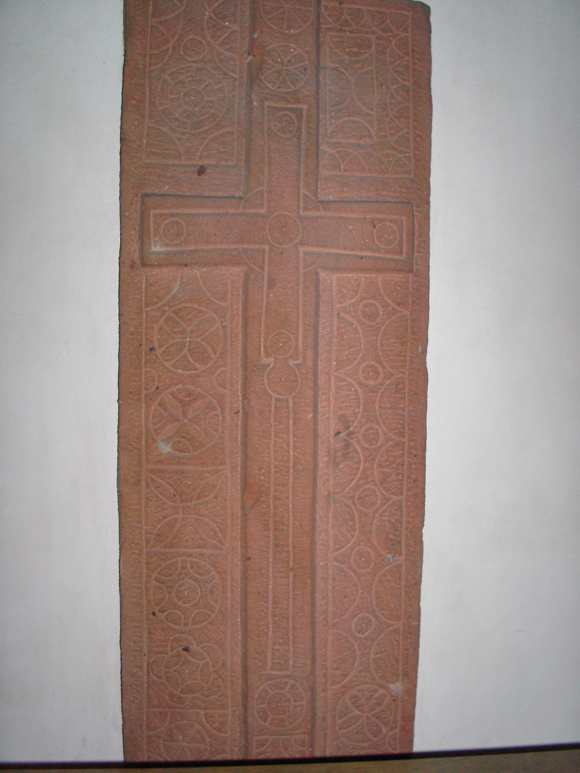 Bischof Reginbald von Dillingen, Speyer, Dom, Grabplatte